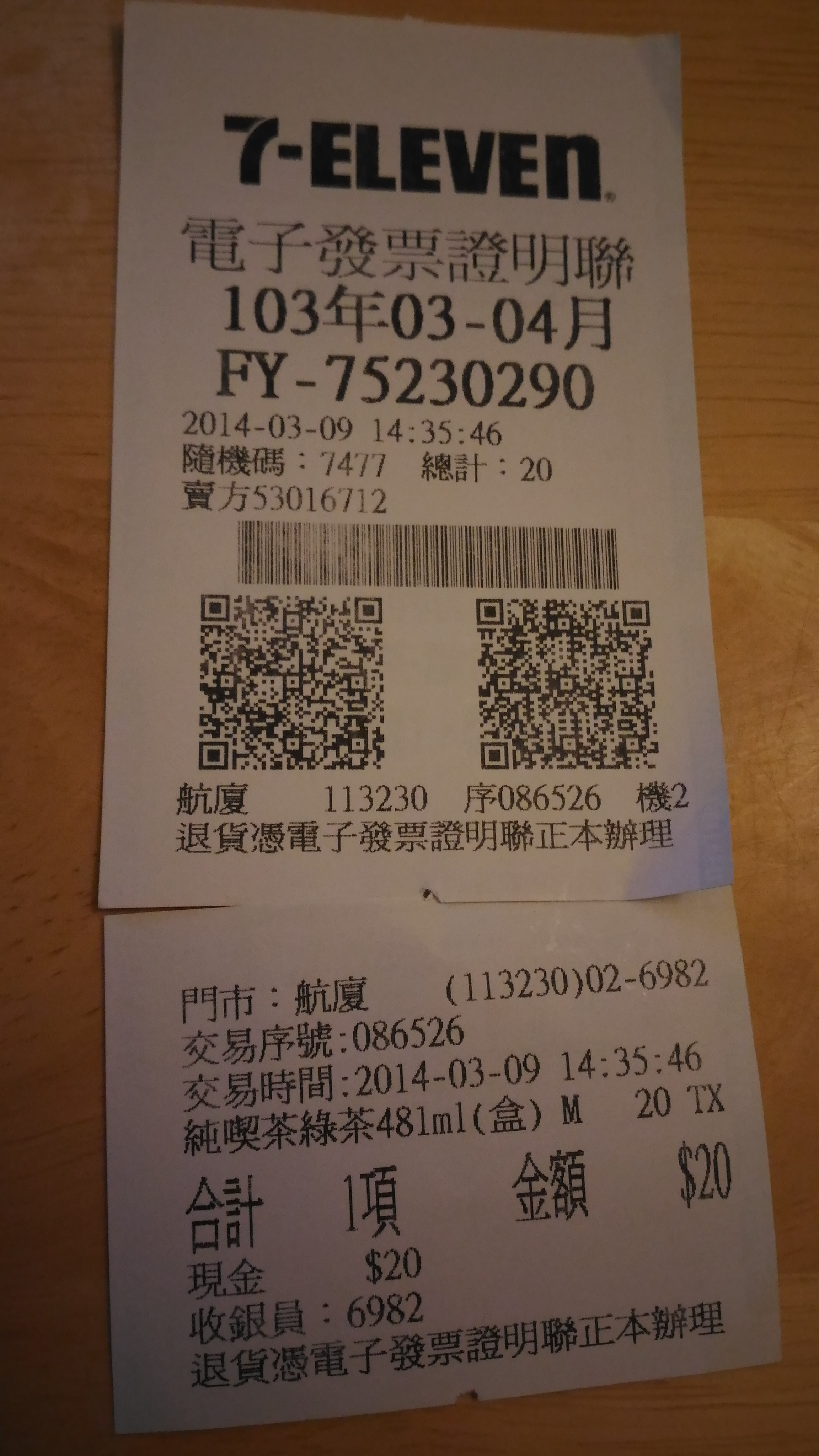 2014年3月9日統一超商航廈門市電子發票證明聯與交易明細。